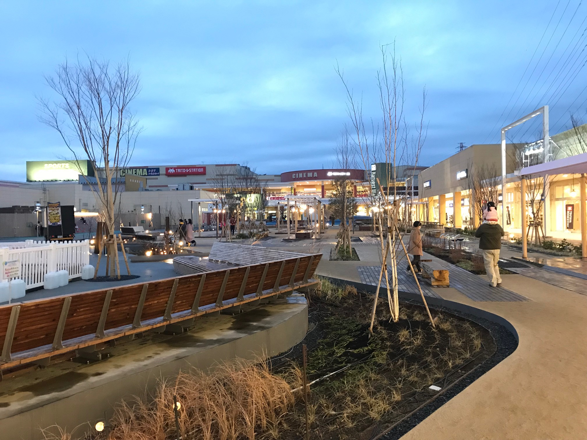 おやまゆうえんハーヴェストウォーク